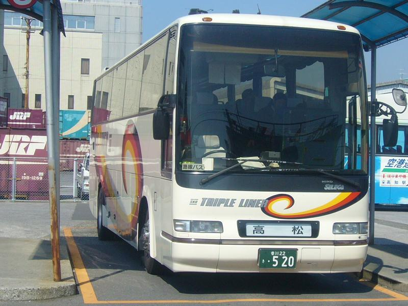 登録番号 香川22き520 四国高速バス所属 各系統で共通運用 2006年4月8日 高知駅前にて撮影 撮影者 Tokatsu kokubu